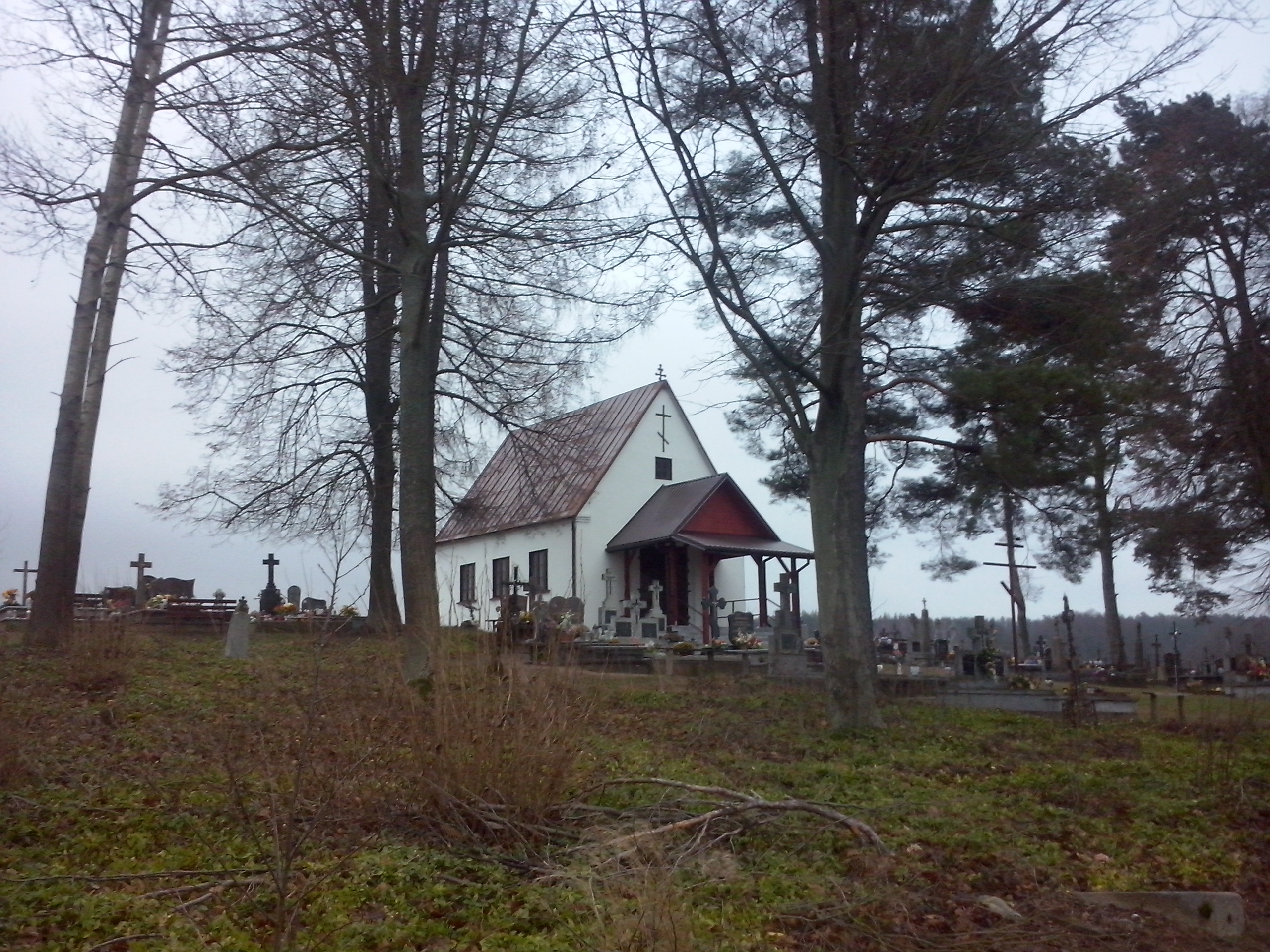 Siderka - cerkiew prawosławna Św. Jana Chrzciciela (filia parafii Jaczno)